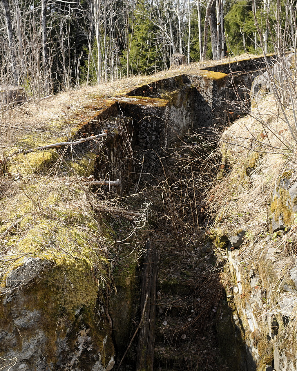 Løpegrav/Dekningsmur